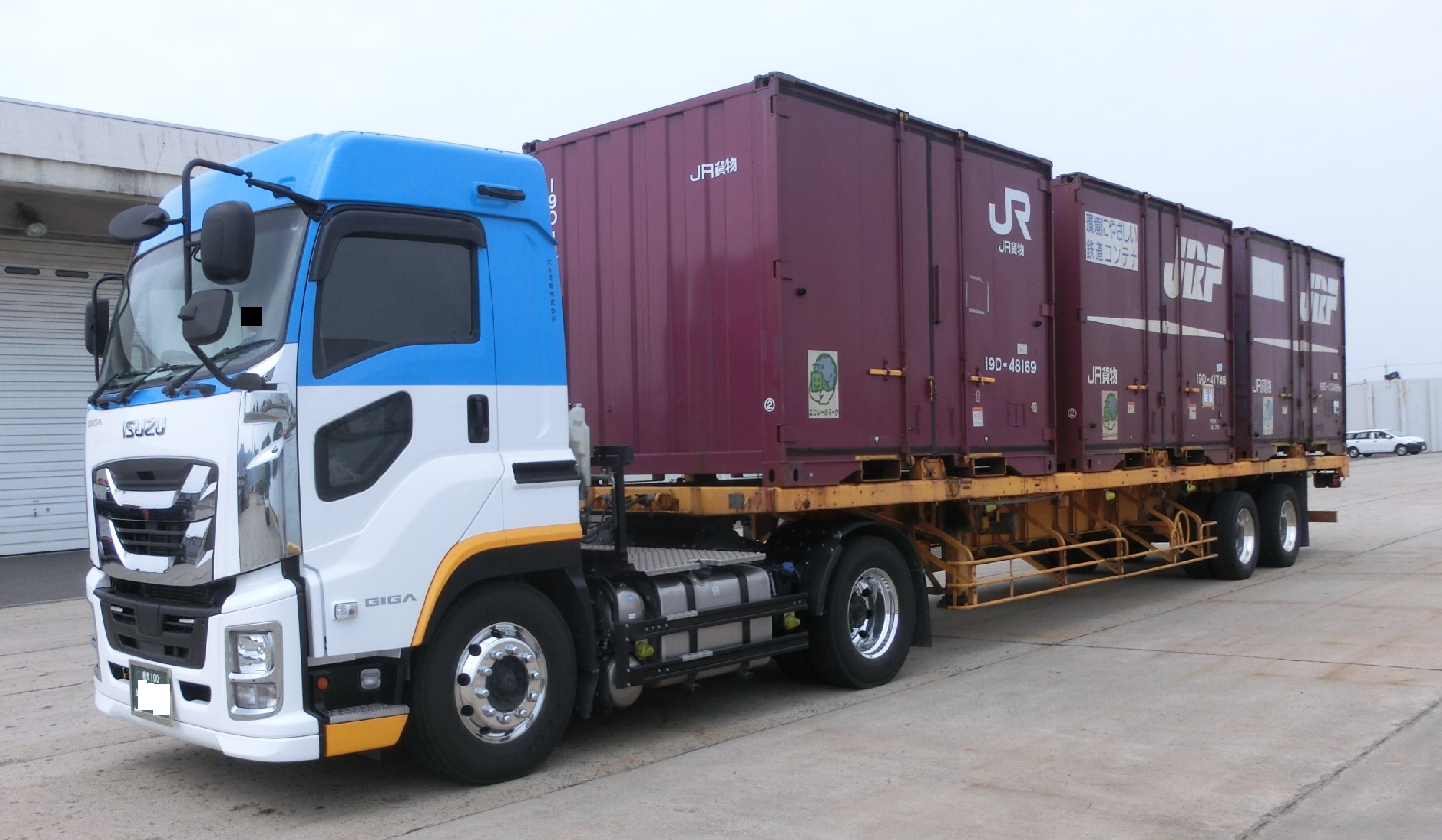 三度目の移転で広大な敷地と、完全に隔離され夜間留置の安全性が高まった岡山市東区にある 「 岡山新港高島埠頭 」 で、JR貨物所有の12ft形コンテナを船舶代行輸送する風景。 停泊している内航船で、北九州港へ一日一往復していた。 内航船の横に設置されたクレーン車で吊り作業を行い、コンテナの敷地内の移動は、二台の10t級フォークリフトで行う。 ＝＝＝＝＝＝＝＝【 総 括 】＝＝＝＝＝＝＝＝ 2018年 ( 平成30年 ) 7月5日 ( 木 ) から岡山県や広島県及び、山口県内の各地で発生した 「 平成３０年７月豪雨 」 の影響により、三県内の山陽本線で複数個所において、線路喪失を含む大規模な輸送障害が三ヶ月以上にわたり発生した。 これに伴い、元々岡山県内の拠点となっている 「 JR貨物岡山(タ) 」 が今回の輸送障害区間では、事実上の東側の終着点駅となり、この影響で福山通運の30ftコンテナのみを一列車貸切っている 「 福山レールエクスプレス号 」 積載の全コンテナを始め、全国からの九州地区向けの大口宅配や冷凍などで大量に扱われていた20ft及び、30ftの大型コンテナを全て 「 岡山(タ) 」 で臨時に取り扱うこととなった。 「 岡山(タ) 」 ではこれらの大型コンテナを最優先輸送させる為に、広島や山口へのトラック代行輸送する臨時便が一気に集中し、荷役能力の逼迫となってしまった。 また岡山県内の水島臨海鉄道の拠点コンテナ駅である 「 東水島駅 」 への関東からの定期列車は、本来はこの 「 岡山(タ) 」 で一部のコンテナの取り卸と、機関車を付け替えてから 「 東水島駅 」 へ中継輸送していたので、この関東便に関してはさほど問題は無かったが、 通常の 「 東水島駅 」 から 「 岡山(タ) 」 で中継して九州向けのルートが絶たれてしまった。 この打開策として、 「 東水島駅 」 ～ 九州向けの入出荷ルートと、近隣の 「 姫路貨物駅 」 や 「 神戸(タ) 」 での置き去り気味で滞留し続ける12ft形5tコンテナ （ 私有コンテナを除く ） の輸送を確保するために、船舶を利用した 「 災害時の鉄道代行輸送 」 ルートとして、中国地区としては初めてとなる福岡県 「 北九州港 」 までの船舶輸送が始まった。 担当港は、「 東水島駅 」 の最寄港となる 「 水島港 」 を利用すれば一番効率もよく、また駅から港までの輸送費も抑えられるが、当初予想されていた約四ヶ月もの期間を一貫して使用できる用地の確保する見通しがたたず、緊急暫定的処置として、初日の7月18日 ～ 約一週間程度の短期間を、地元の水島港 （ 実地港区は不明 ） で取り扱うこととなった。 7月下旬からは、荷役埠頭敷地や荷役設備の受け入れ準備が整った、東水島駅から陸路で約30キロ離れた岡山市南区の 「 岡山港福島埠頭 (ゲートも無く出入り自由地区) 」 で、8月31日までの期限付きで着地港の変更無く 「 水島港 」 から引き継がれてた。 更に9月1日からは、積み残しや陸路の輸送待ちで安全に夜間でも留置できる設備の確保として、荷役埠頭がフェンスで完全に区画管理されて専用使用できる、陸路で約三キロ離れた河口対岸の岡山市東区にある 「 岡山新港高島埠頭 」 へ、再度移転して一連の代行輸送が最終日となる、9月28日の下り便の出航まで続いていた。